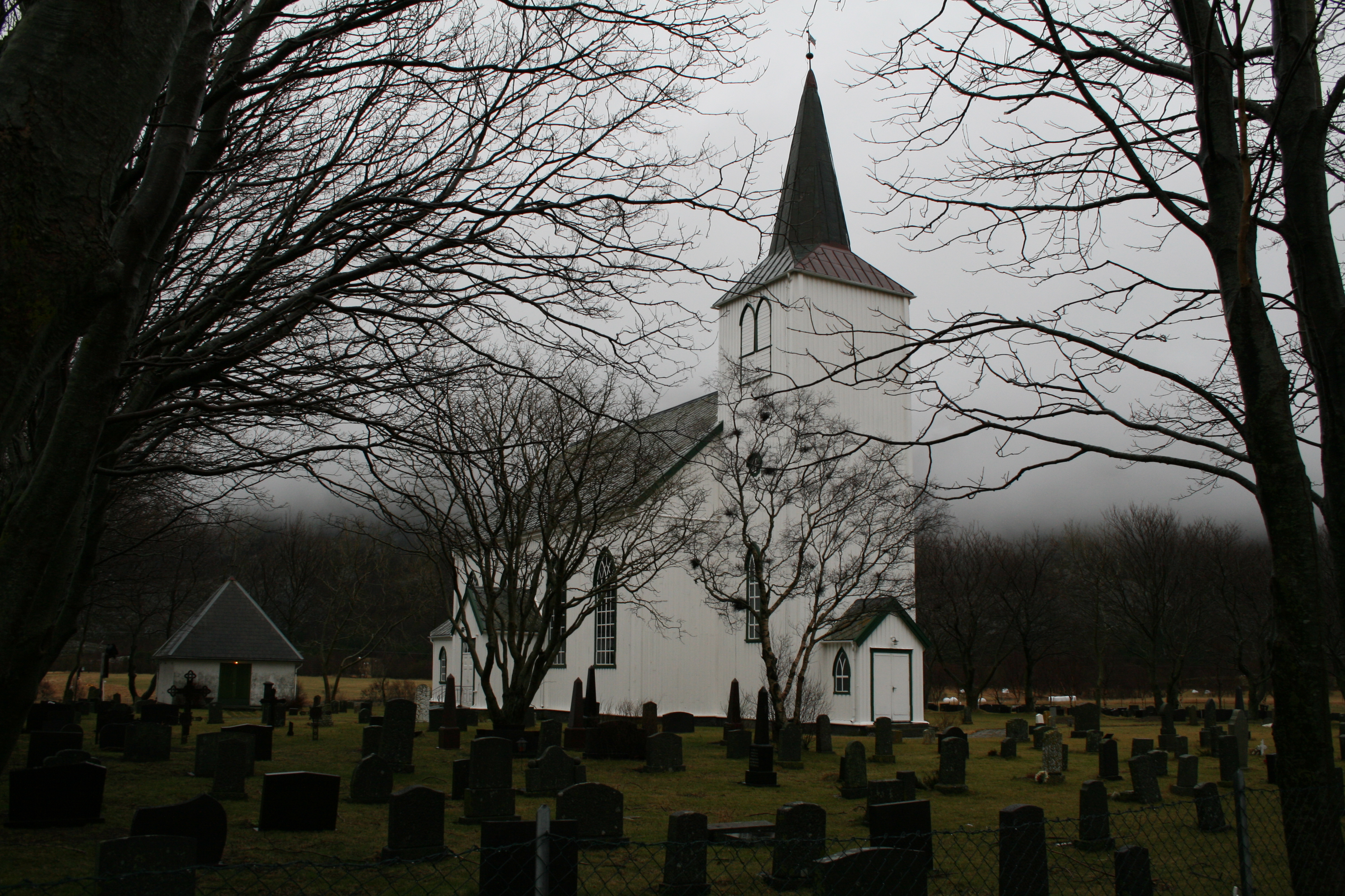 Nes kirke i Bjugn, Sør-Trøndelag, Norway